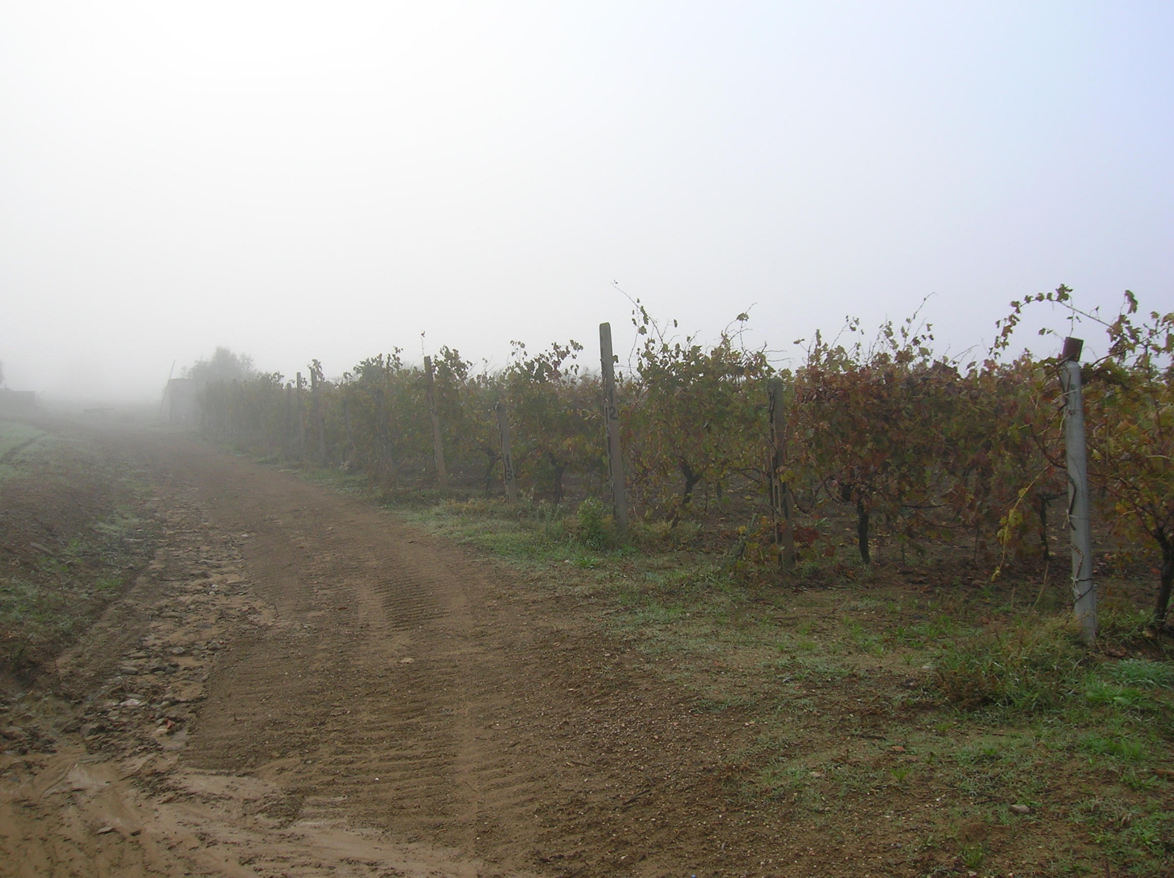 Una capezzagna che dà accesso ai filari, foto scattata in un mattino nebbioso, Roselle, Toscana, Italia